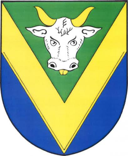 znak, Volárna, okres Kolín